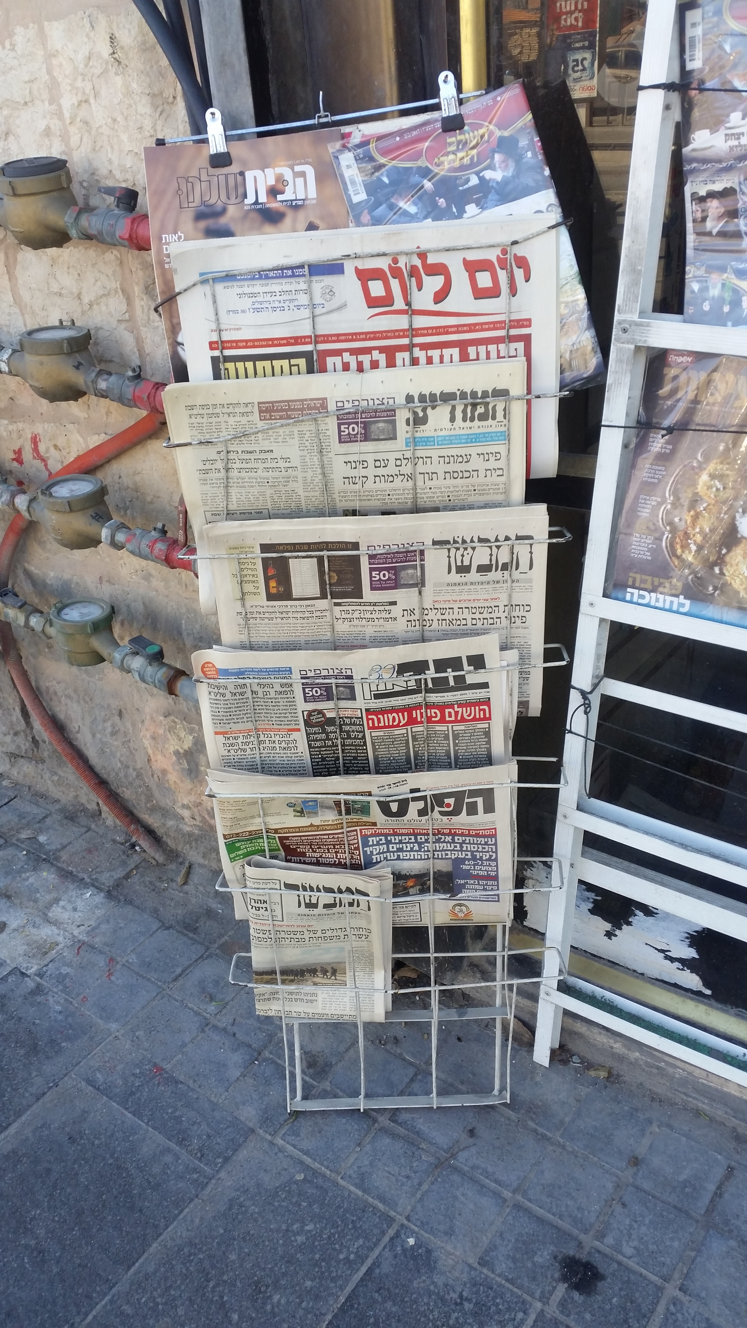 עיתונים חרדיים בחנות בירושלים ברחוב יפו.